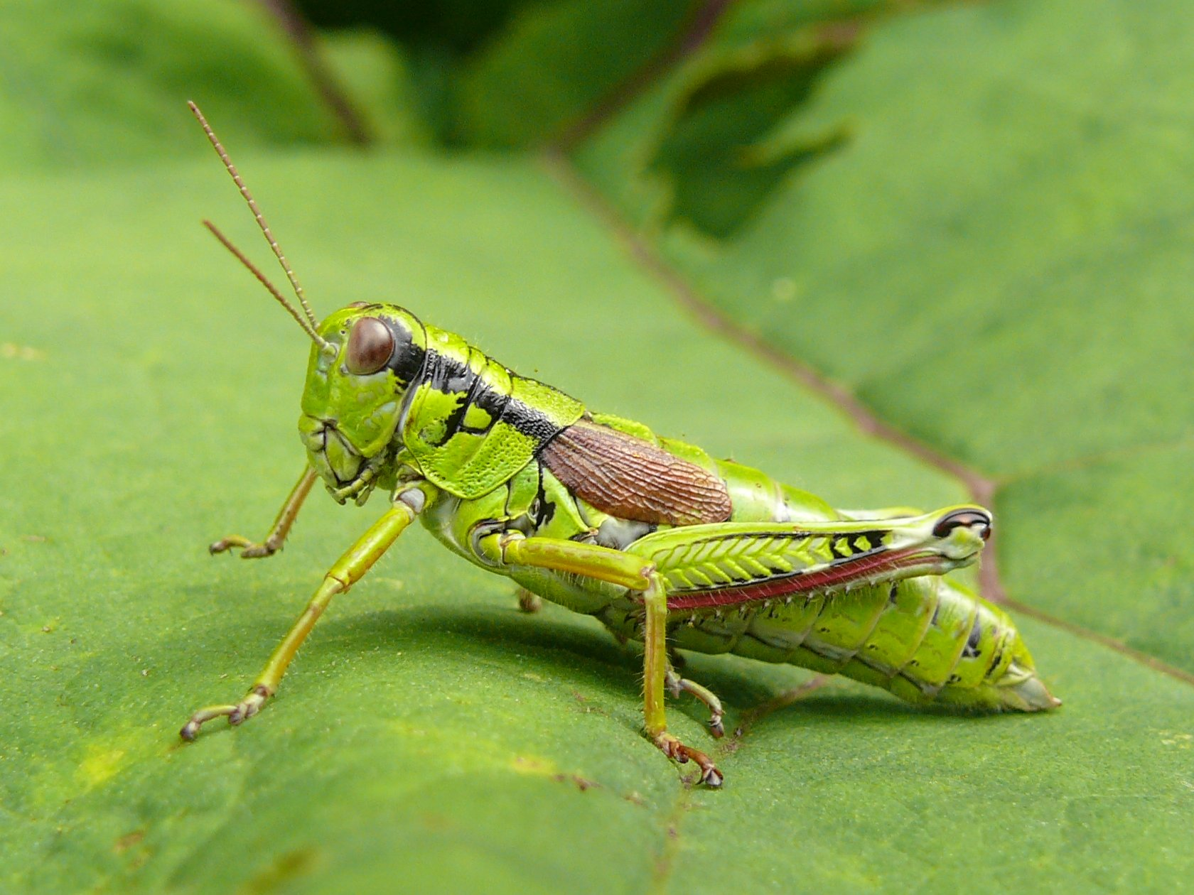 Miramella alpina